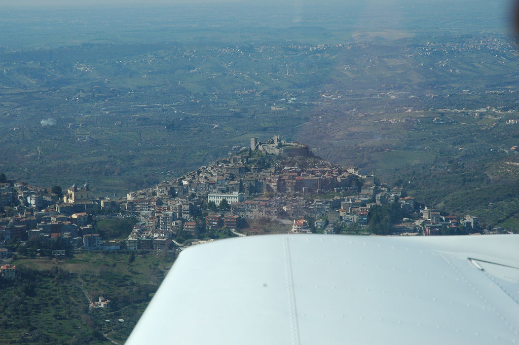 Frazione of Montecelio (not Sant'Angelo Romano) of Guidonia Montecelio